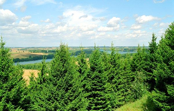 Mazuria from Gora Jesionowa in Podlesie (Poland)